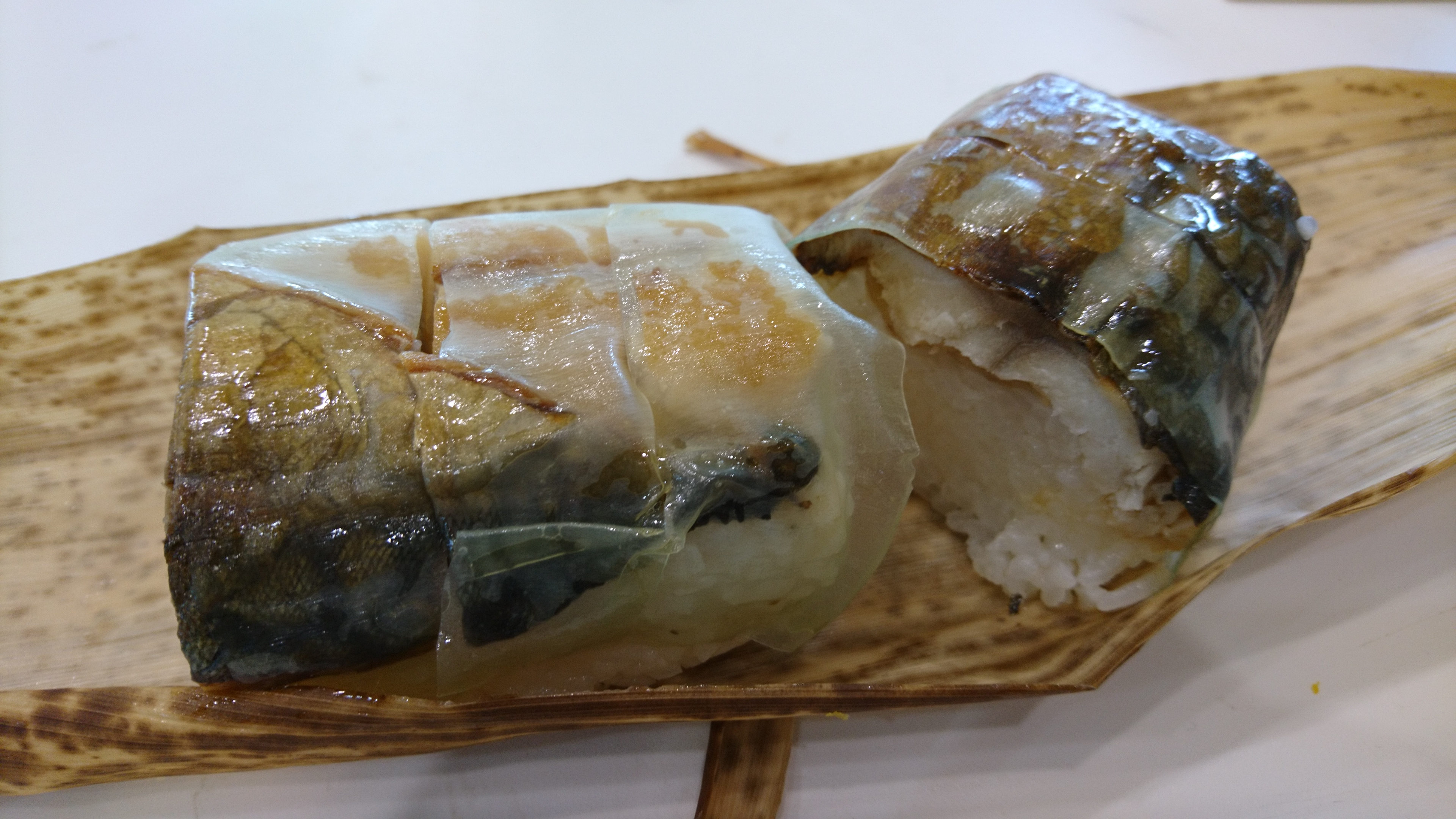 宮津遺産に認定されている料亭ふみやの焼き鯖寿司